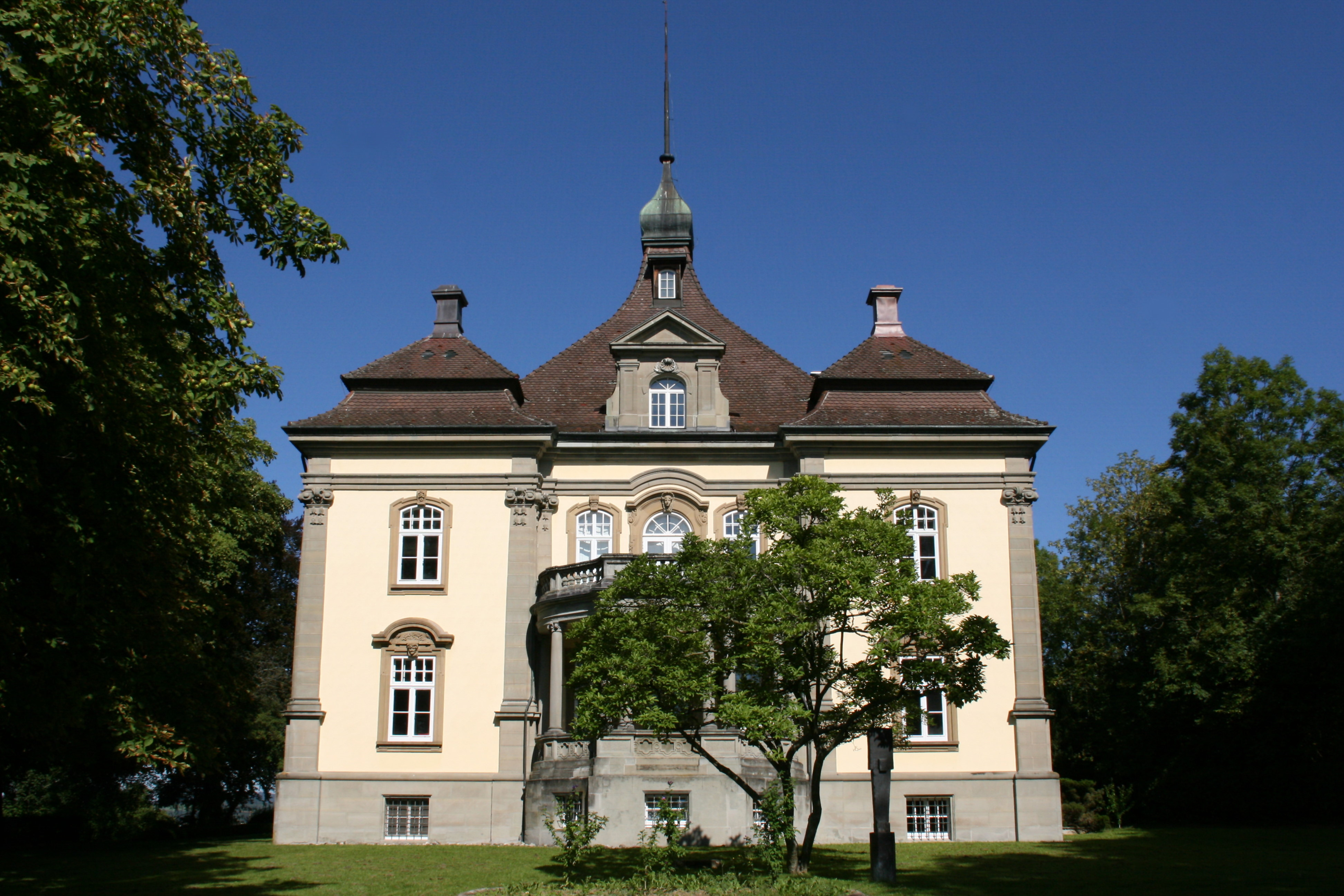 Schloss Rauenstein, Rauensteinstraße 66 in Überlingen